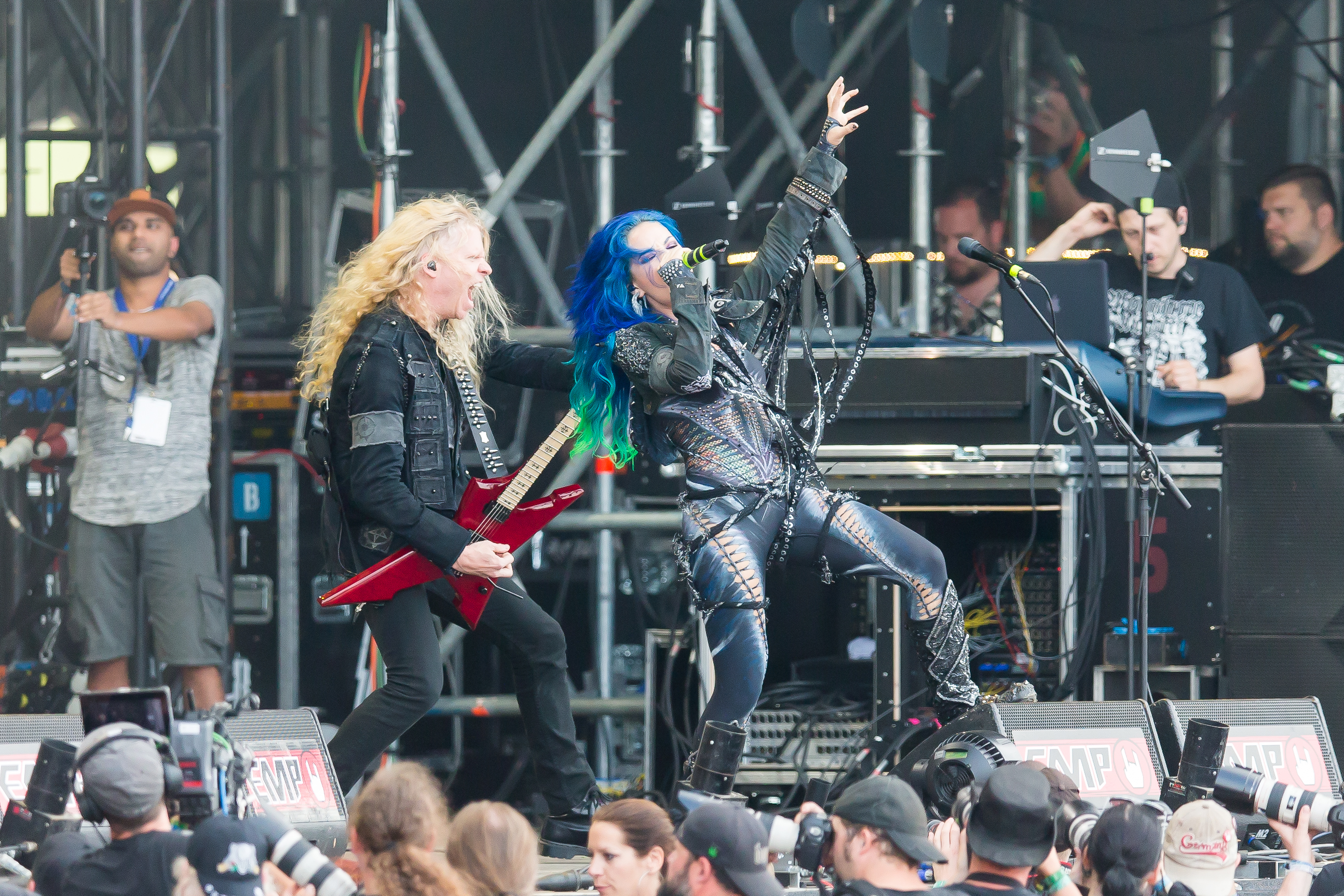 Arch Enemy during Summer Breeze 2016 at , Dinkelsbühl, Bayern, Germany on 2016-08-19, Photo: Sven Mandel